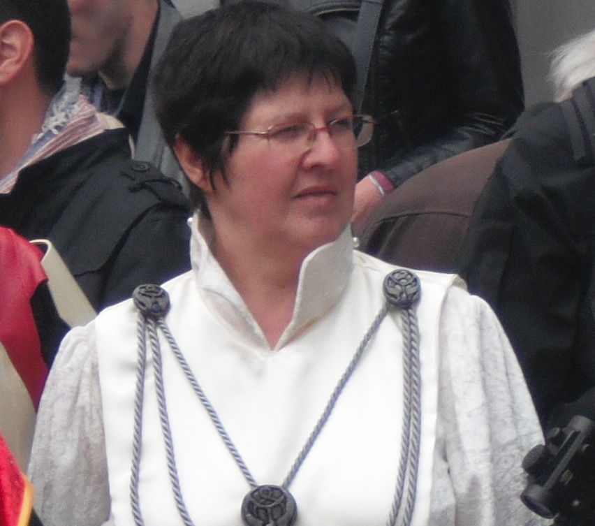 Mon Mothma Cropped